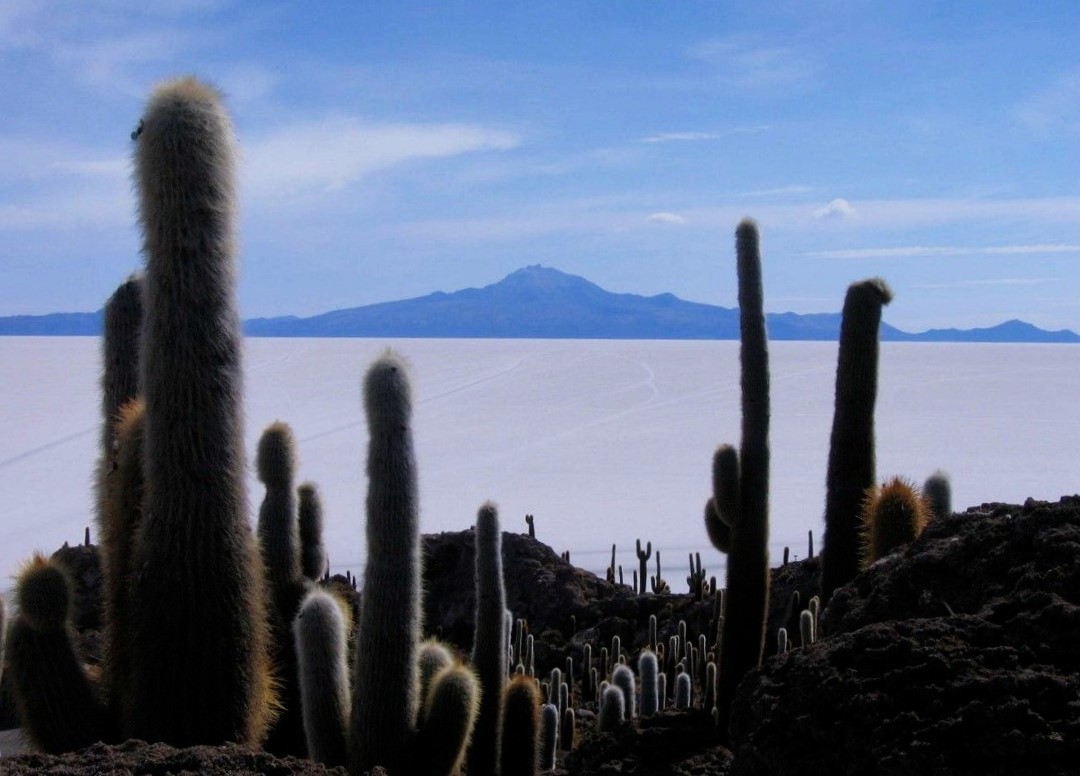 Le Salar d'Uyuni, Uyuni.- Département de Potosí, Bolivie.